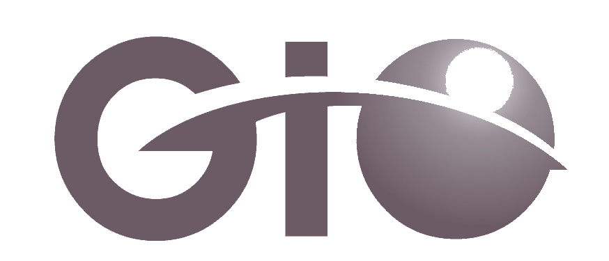 2001年12月31日至2012年5月20日，中華民國行政院新聞局標誌